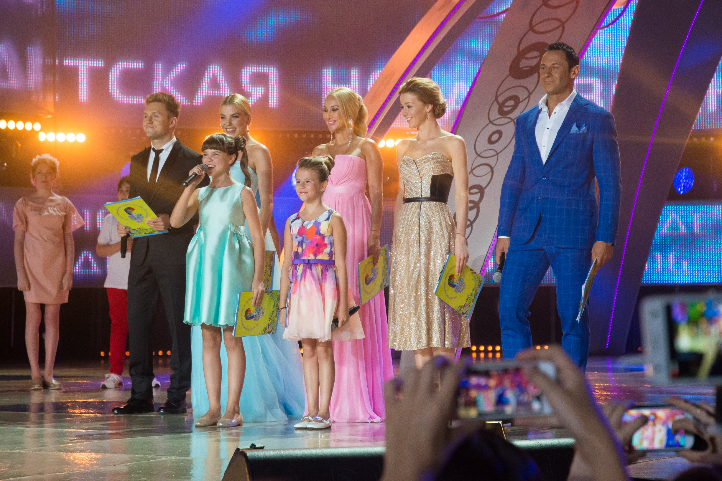 Ведущие Детской Новой волны 2016